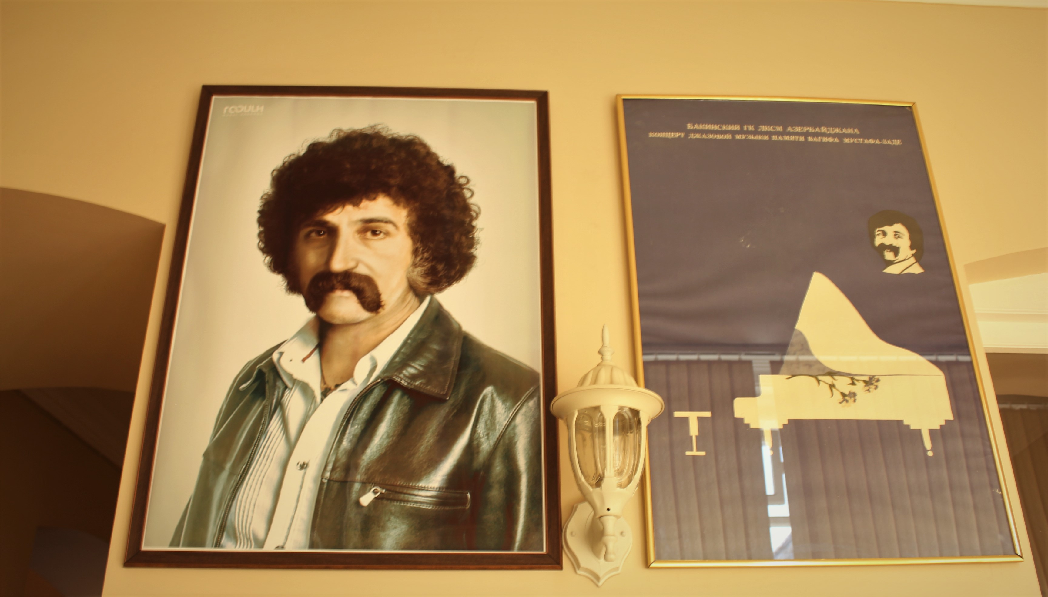 Афиши в доме-музее азербайджанского джазового композитора и пианиста Вагифа Мустафазаде.